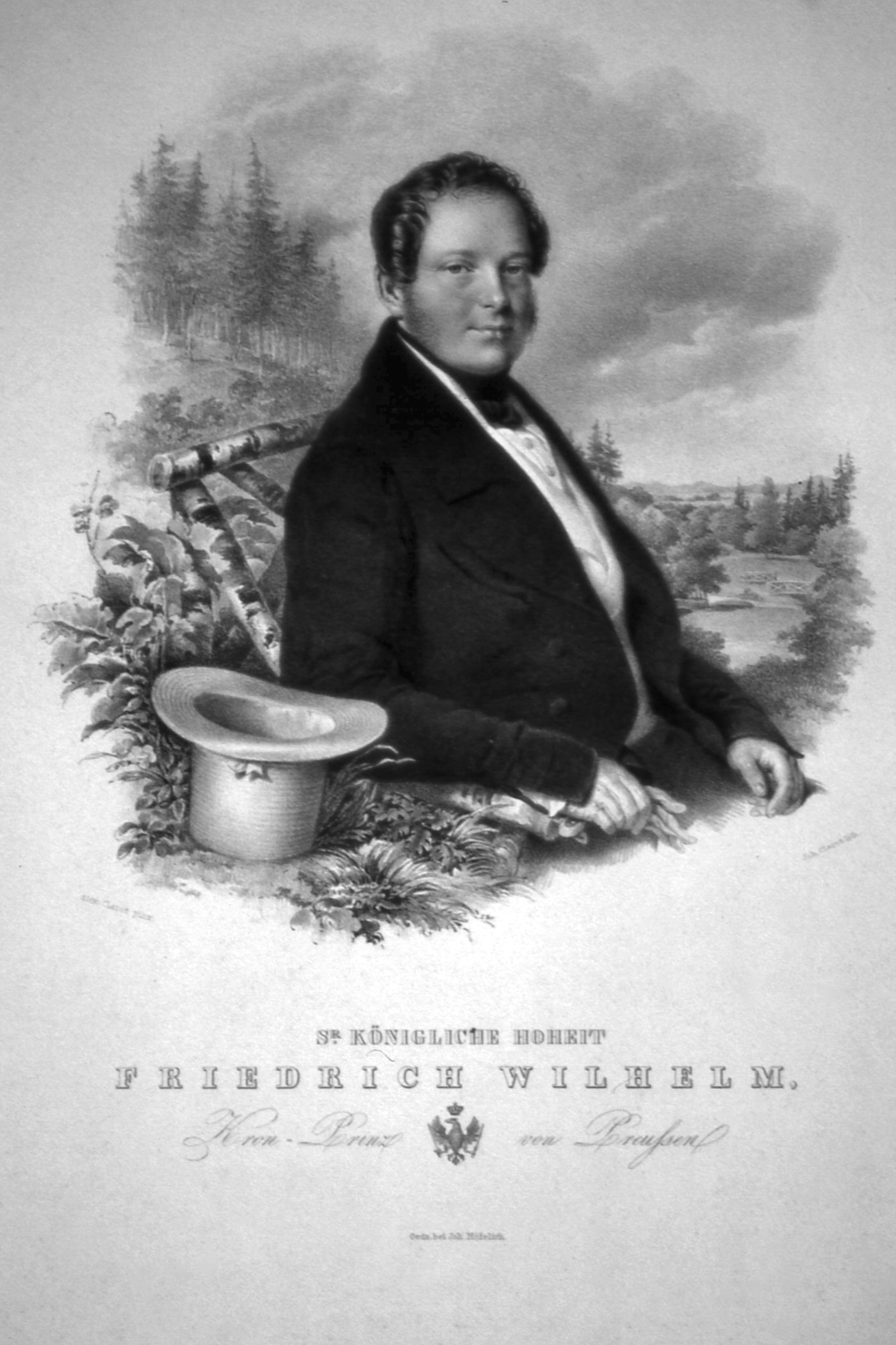 König Friedrich Wilhelm IV.